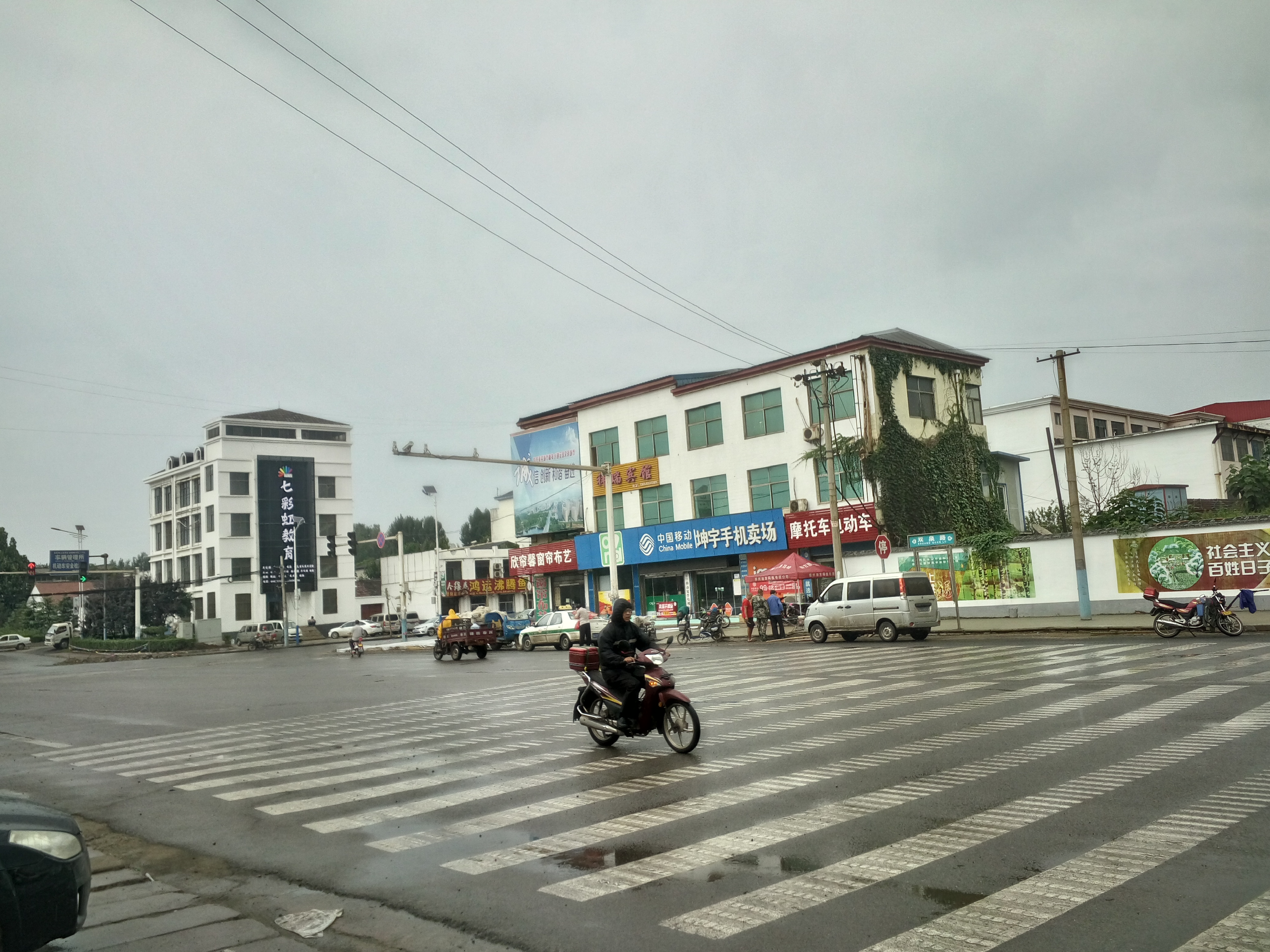 里辛镇双泉路